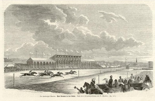 Die Hamburger Rennen: Das Rennen in der Bahn, originaler Holzstich aus dem Jahr 1860